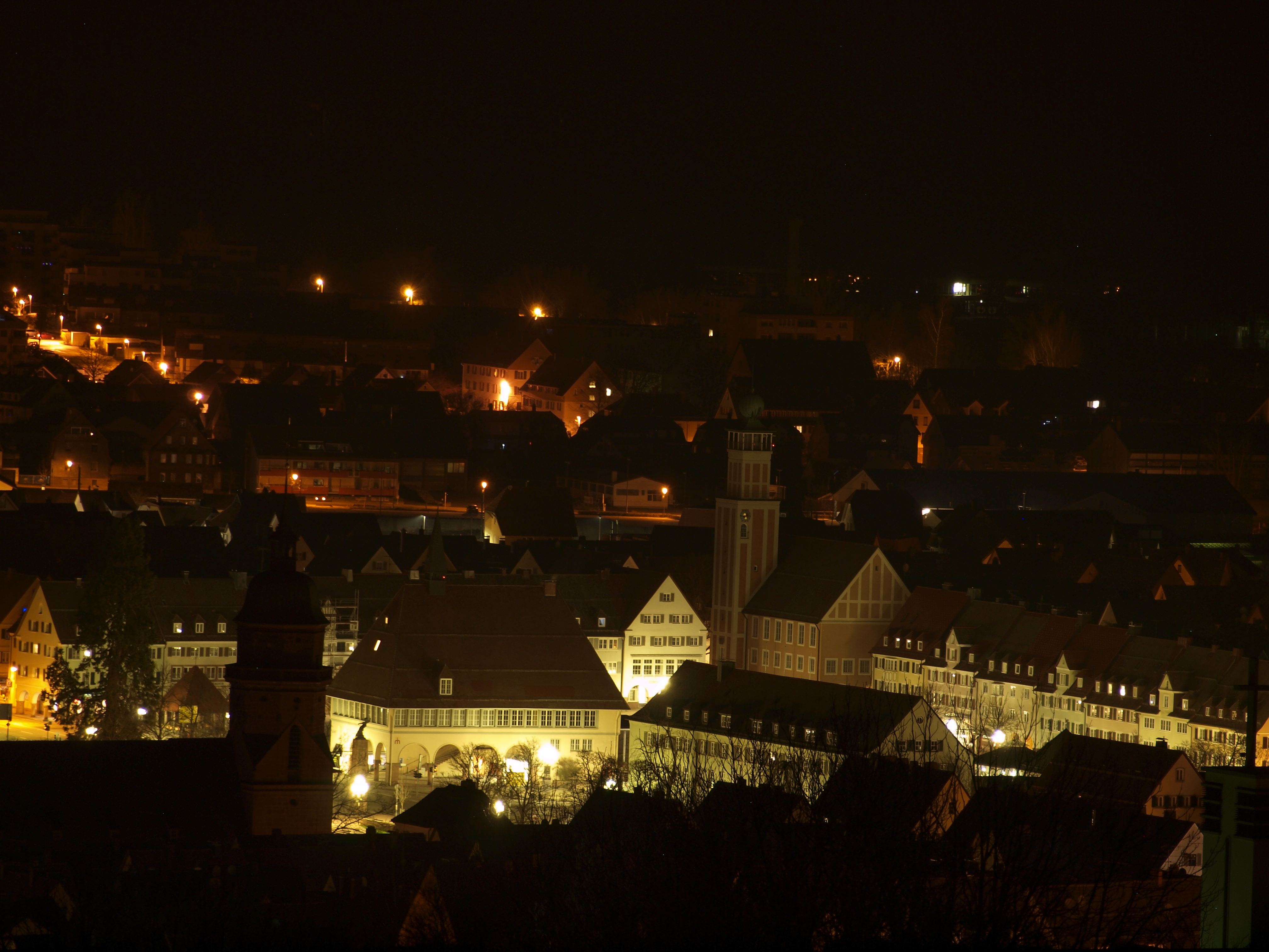 Ein Grandioser Blick auf einen Teil des Freudenstädter Marktplatzes, eingefangen mit einer Olympus E-600 vom Friedrichsturm aus. Fotografiert von Frank Saßnowski [DesAnderes] Speziellen Dank an Kevin Damske für die Idee dieses Werk dieser Enzyklopädie zur vergügung zu stellen.